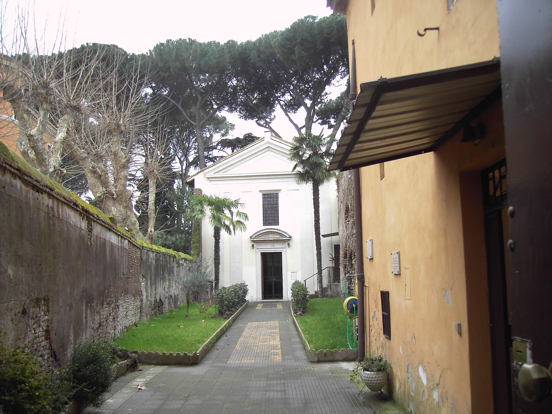 Roma, san Tommaso in Formis